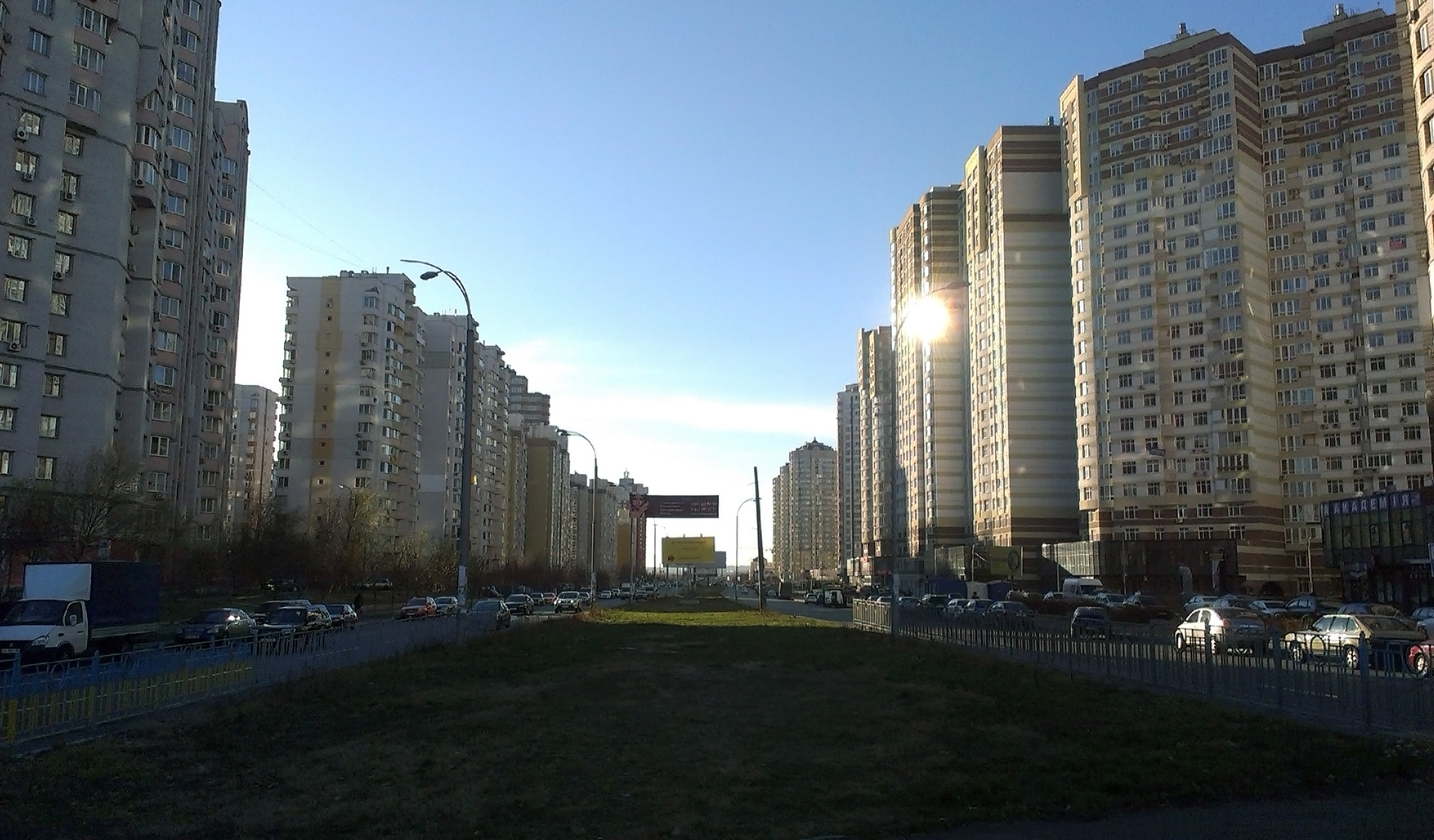 Київ, вулиця Анни Ахматової, вид в бік Дніпровської набережної від перехрестя з проспектом Петра Григоренка